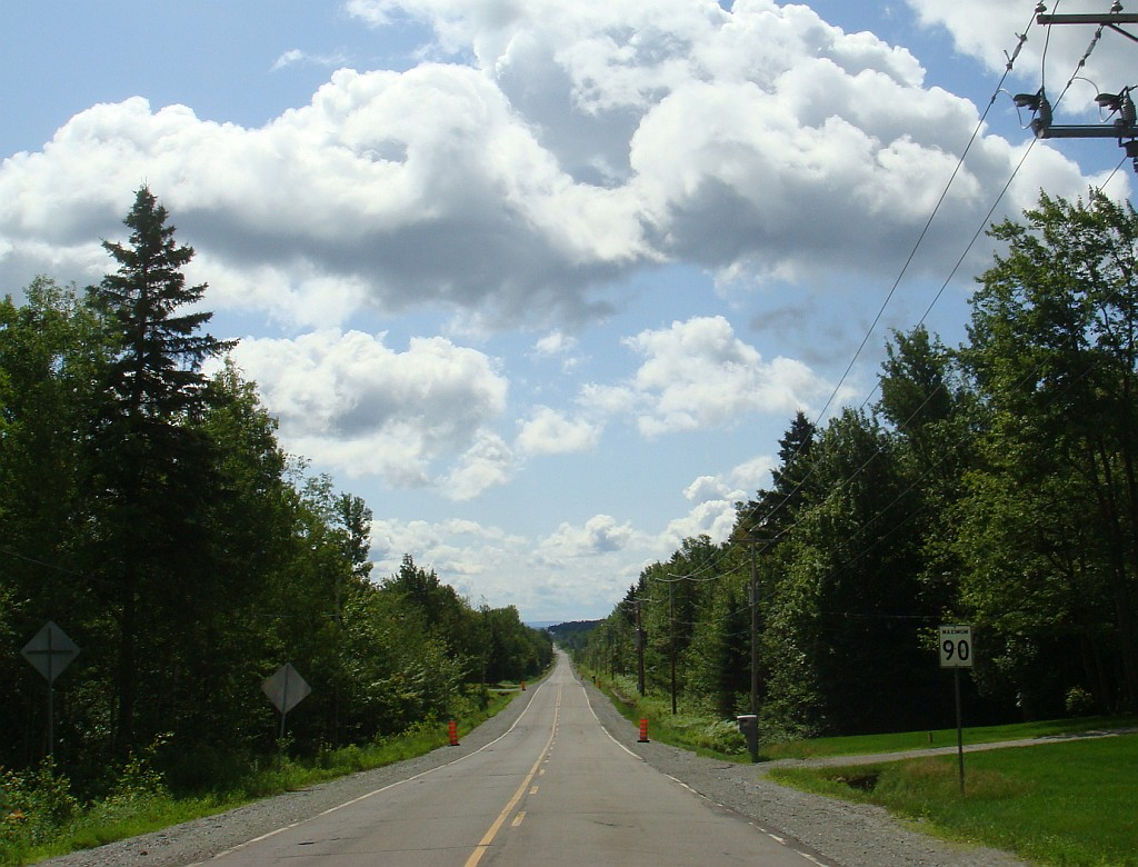 Photo de la route 283, près de Saint-Fabien-de-Panet, Québec, Canada.